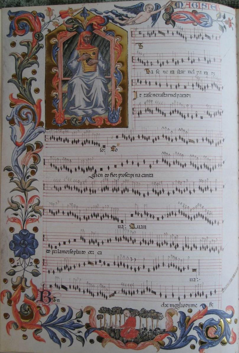 Ita se n'era star nel paradiso, Codex Squarcialupi